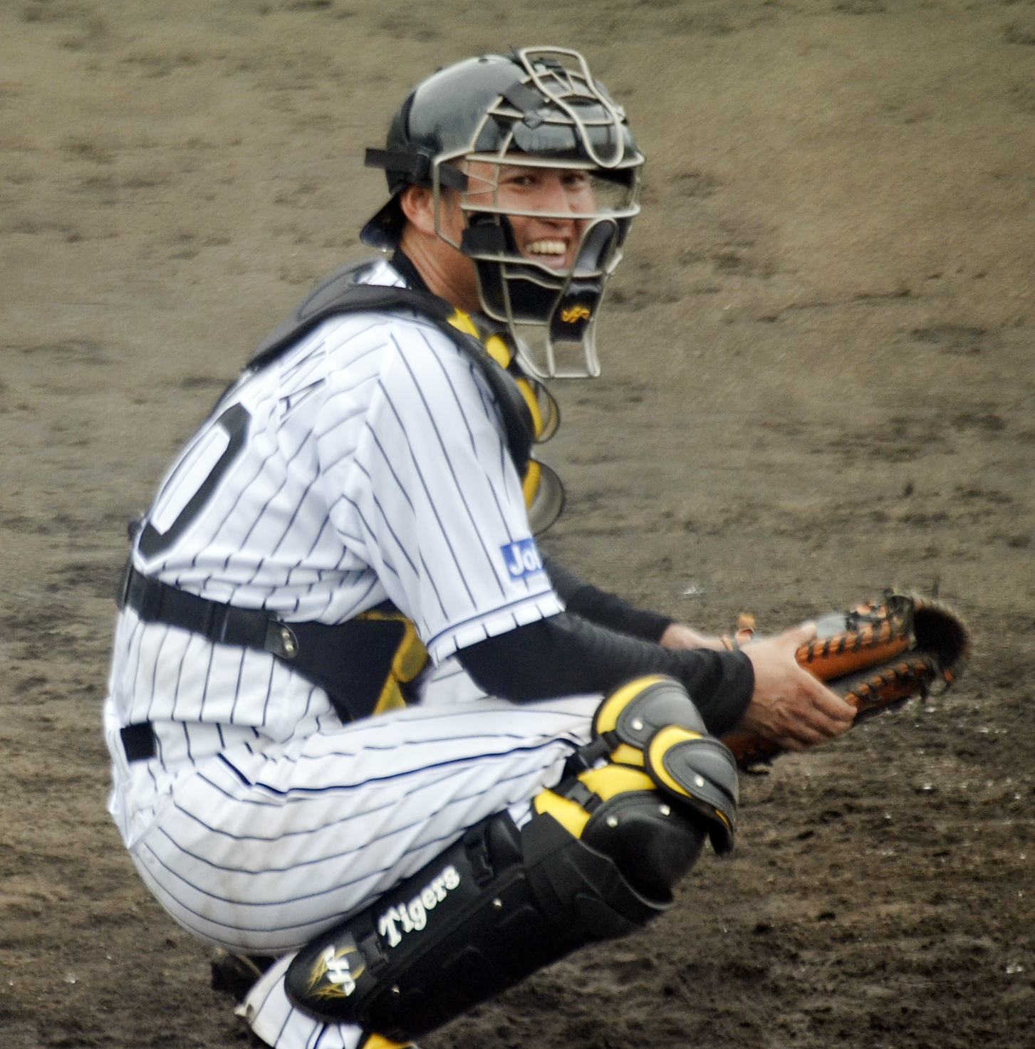 鶴岡一成選手現役最後の日(2016/9/28)